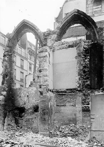 Restes d'ogives